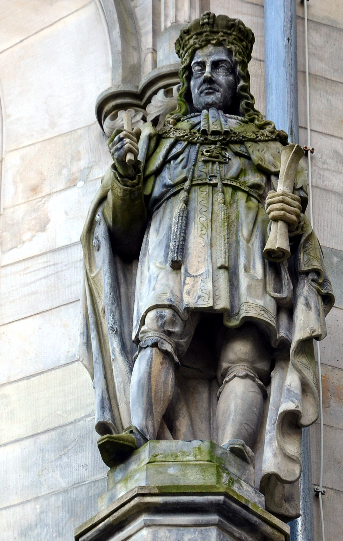 Die Figur von Georg I., König von Großbritannien und Irland und Kurfürst von Braunschweig und Lüneburg schuf der Bildhauer Carl Rangenier im Rahmen einer mehrteiligen Auftragsarbeit beim Bau des Welfenschlosses in Hannover. Die Skulptur findet sich an der Fassade des Schlosses in Richtung Welfengarten ...